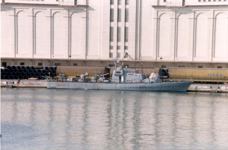 Patrullero Acevedo, de la Armada Española, perteneciente a la Clase Barceló